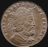 Medaille mit dem Konterfei von Childebert I. aus der englischsprachigen Wikipedia